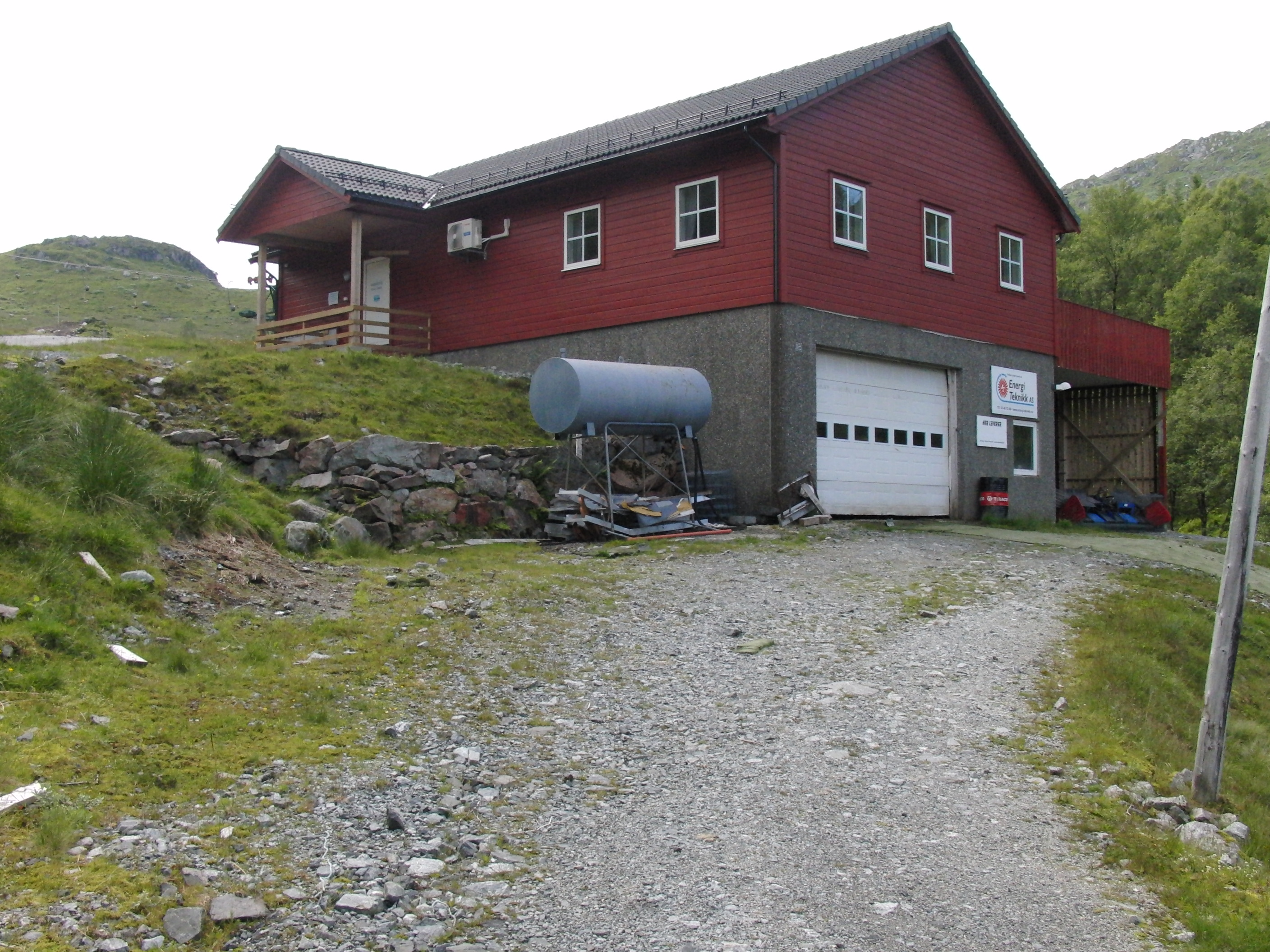 Fjellhaugen kraftverk